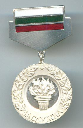 Медал на почетното звание „Заслужил“